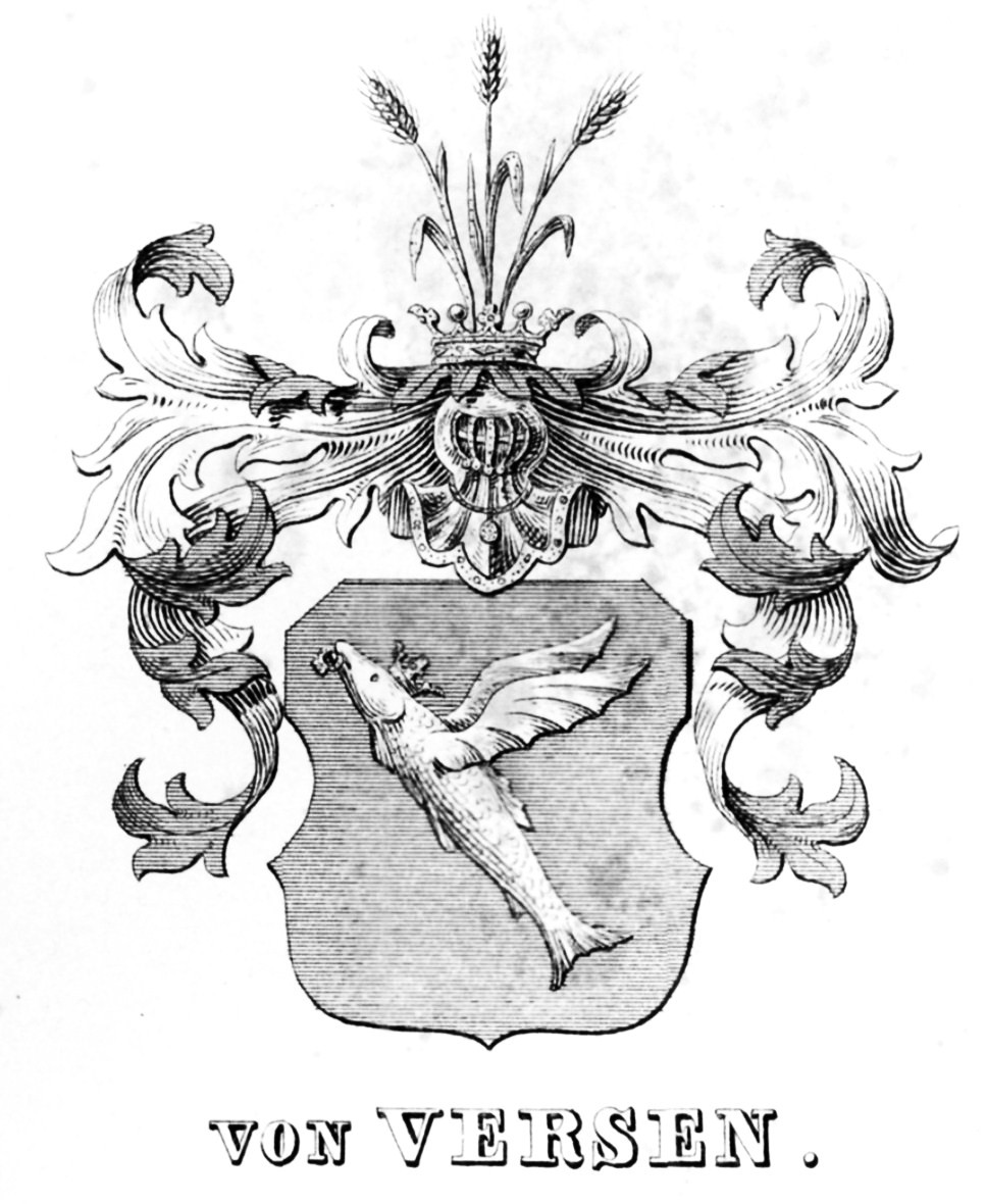 Wappen der Familie von Versen (auch: Fersen).